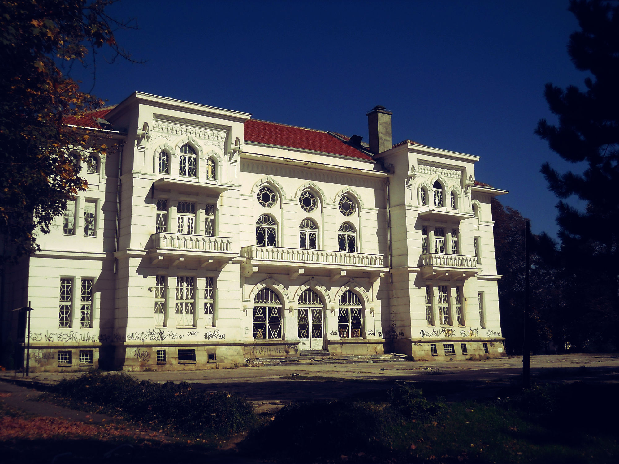 Објект Дом на ЈНА, ул.”Маршал Тито” бр.147, Офицерски Дом Битола